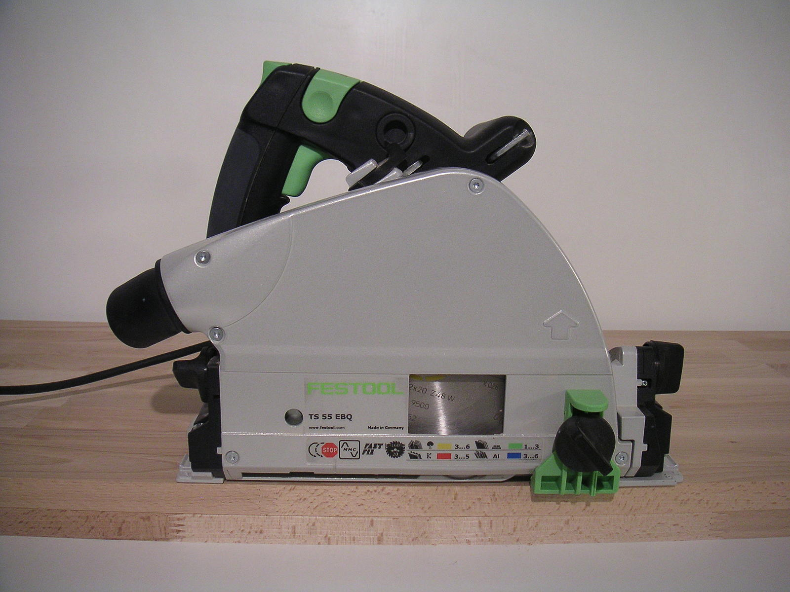 Tauchkreissäge Festool TS 55 EBQ